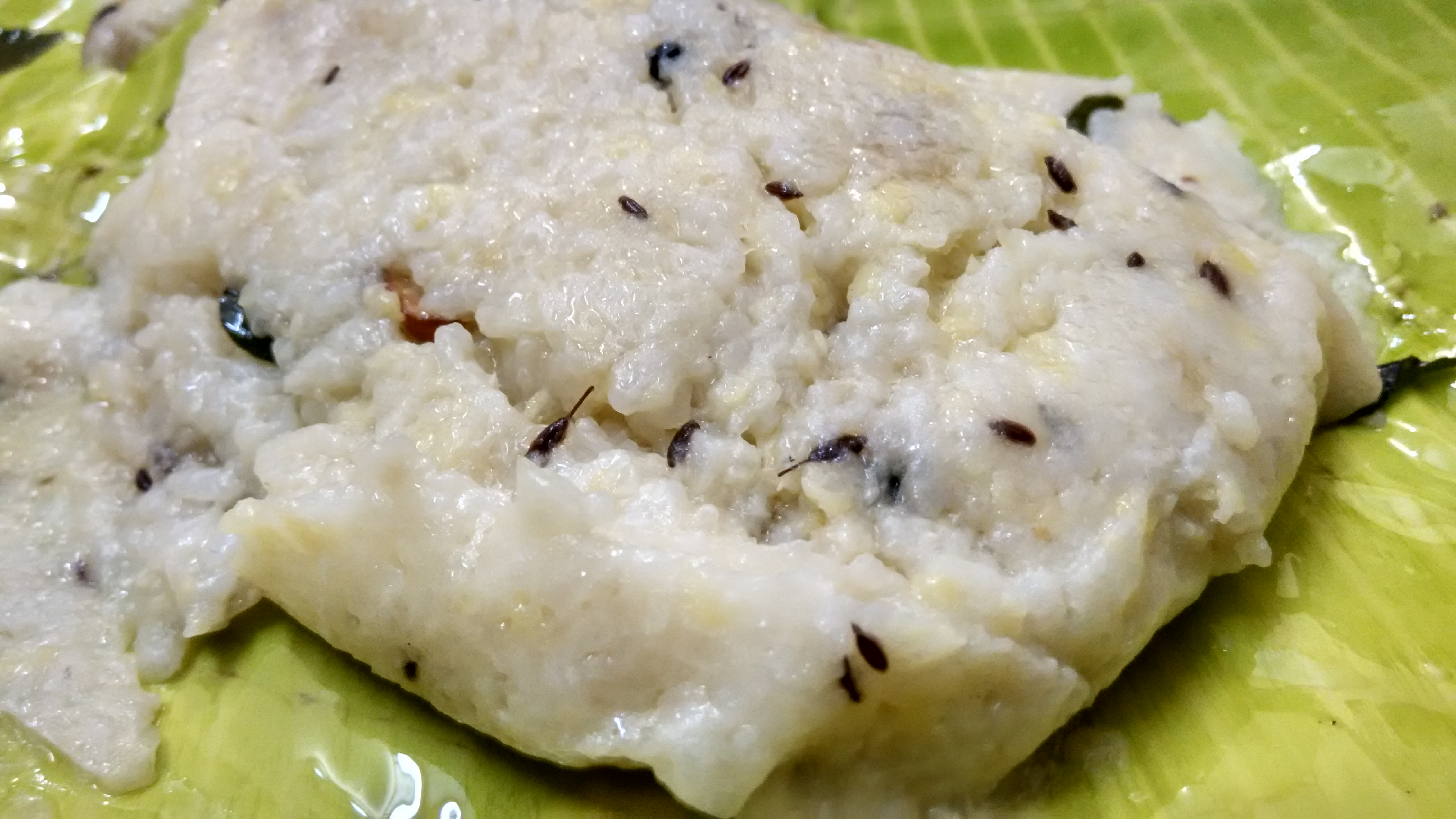 வெண் பொங்கல்.